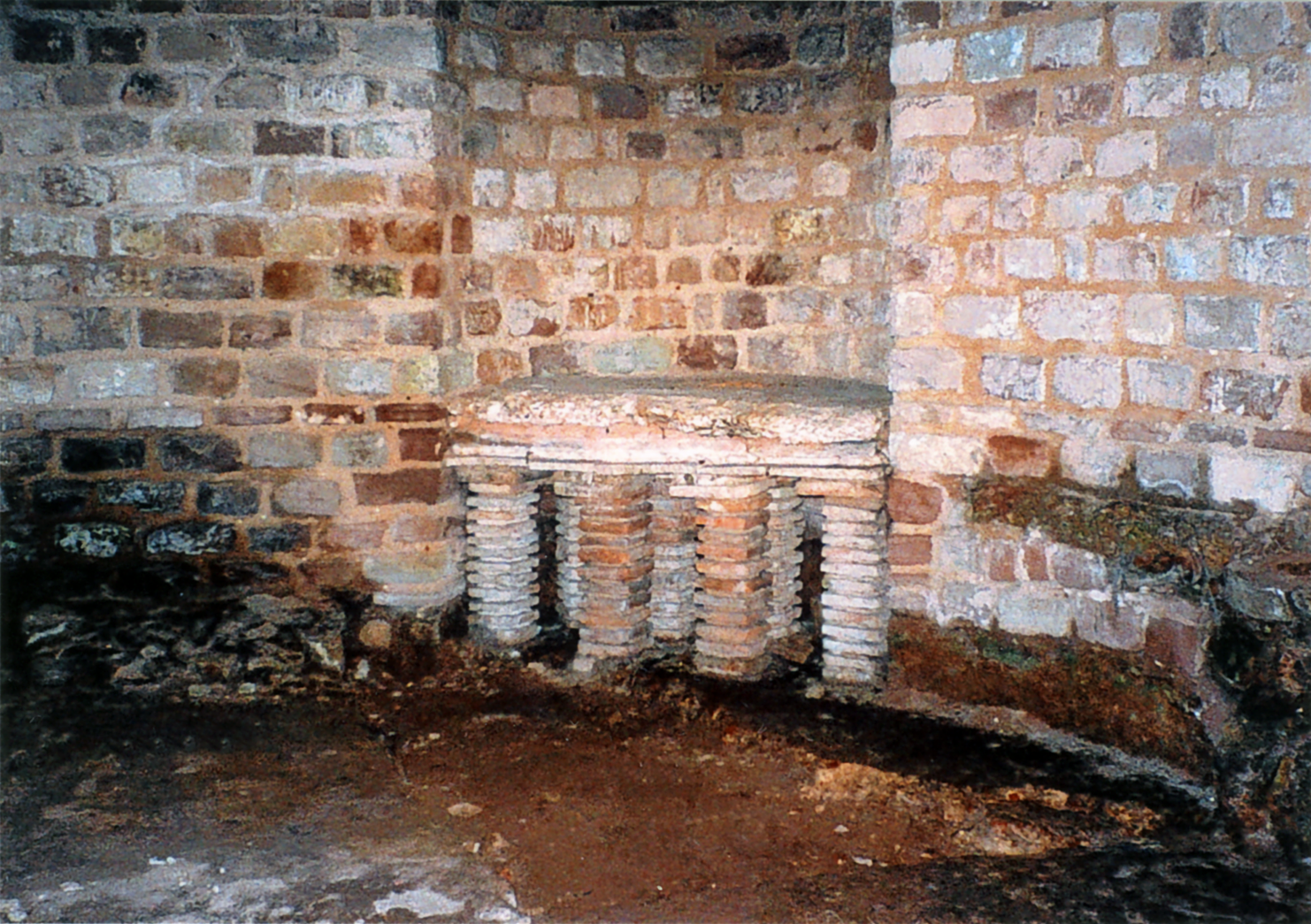 Trier, Kaiserthermen: Vorthermenzeitlicher, hypokaustierter Raum, der sich am Rand der unterirdischen Bauteile der Thermen erhalten hat und seit 1970 für Besucher sichtbar ist.